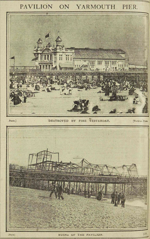 Pavillon du Britannia Pier (Great Yarmouth) avant et après l'incendie volontaire opéré par les suffragettes Evaline Hilda Burkitt etFlorence Tunks en 1914